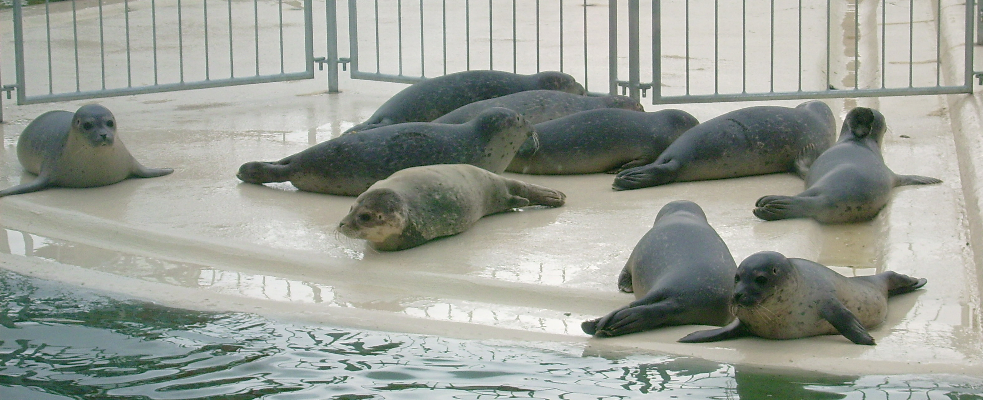 Robben in der Aufzuchtstation